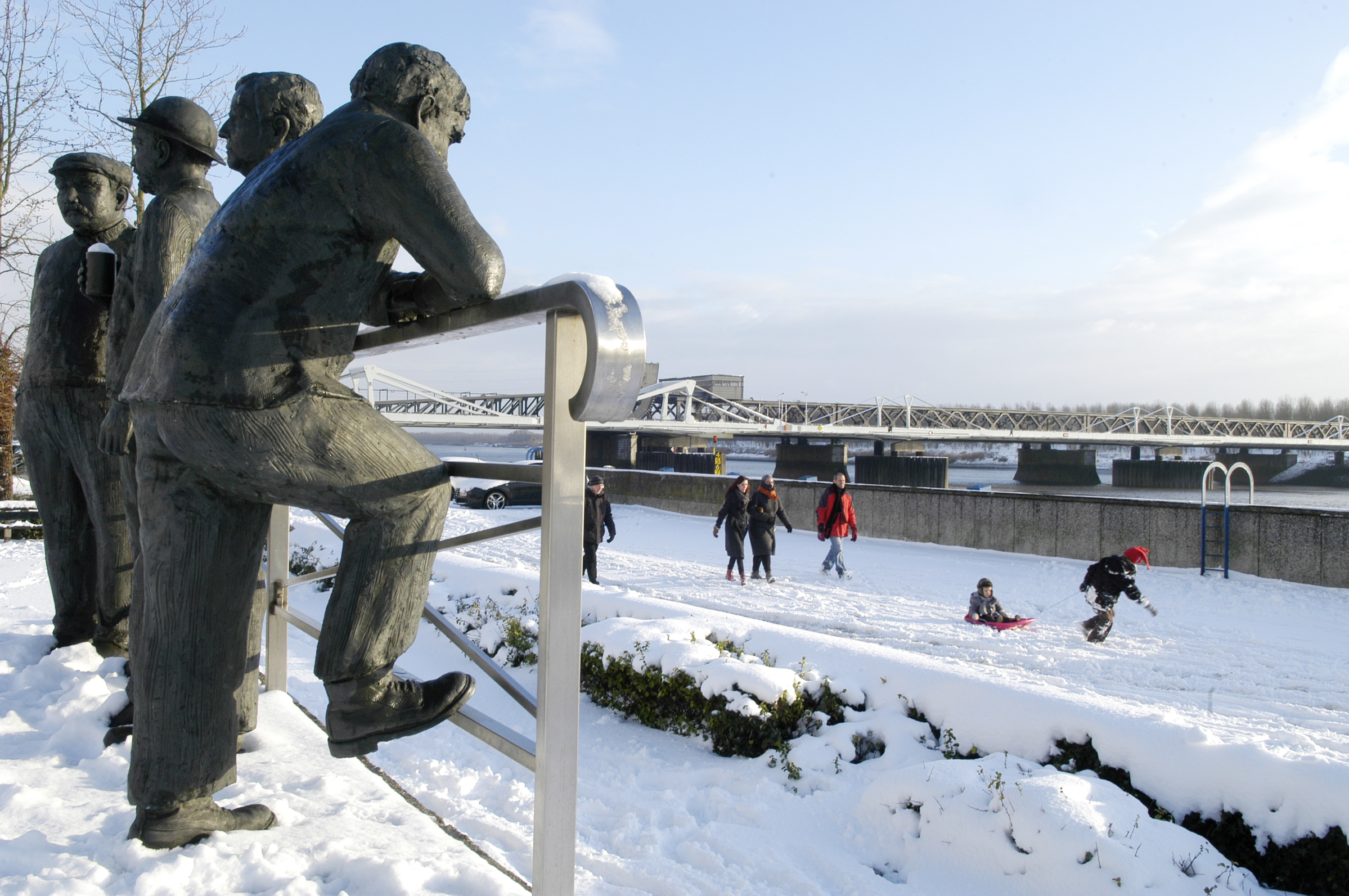 sneeuwlandschap: Beeld de Kaailopers in Temse, met in de achtergrond de twee grootste bruggen van België